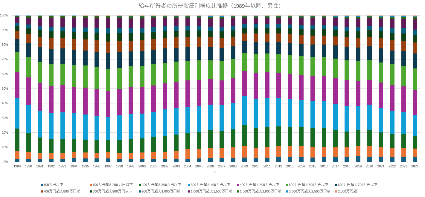 1989年以降の男性給与所得者の所得階層別構成比推移（100%積み上げ縦棒）